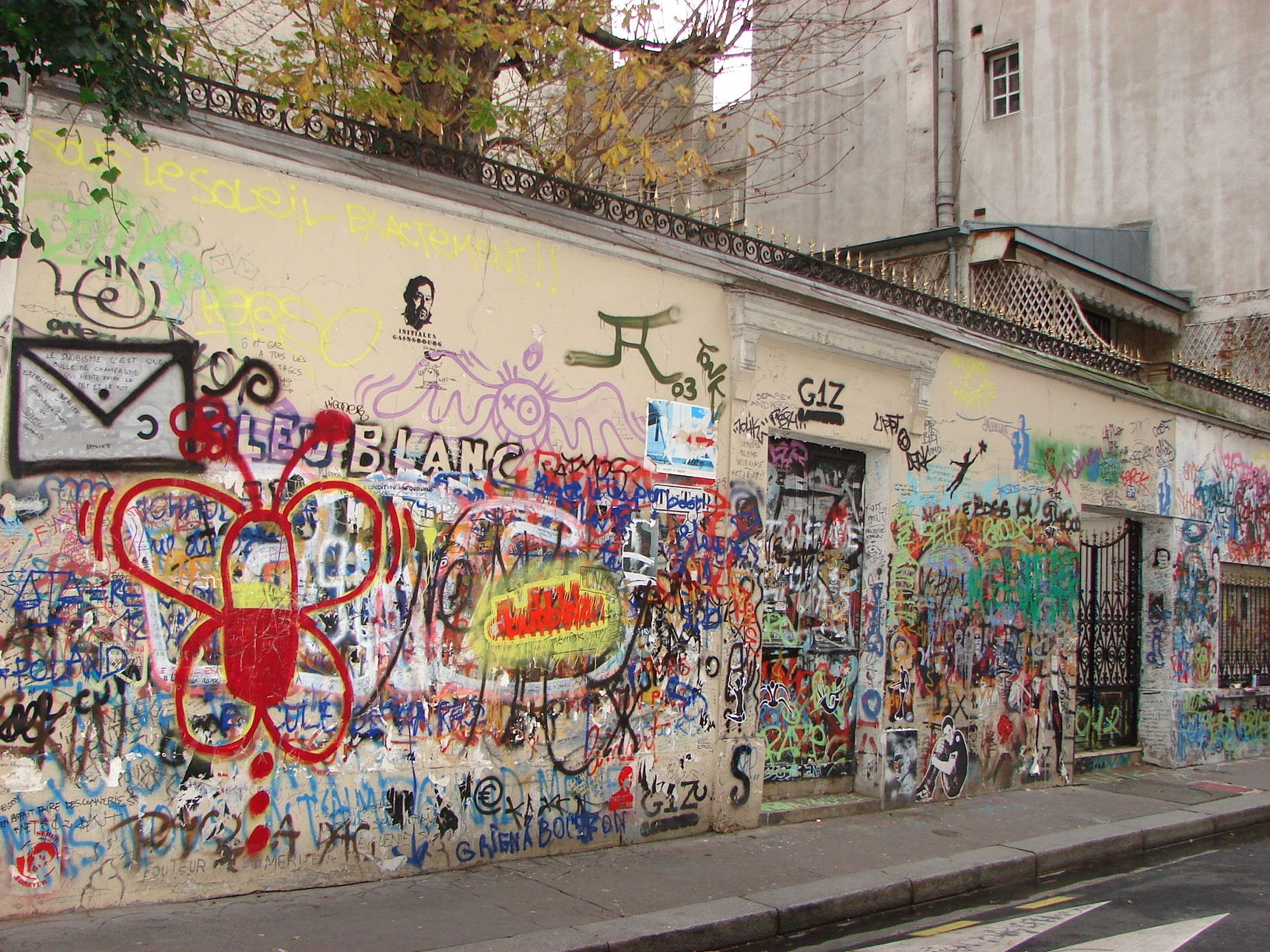 Tags sur la maison de Gainsbarre